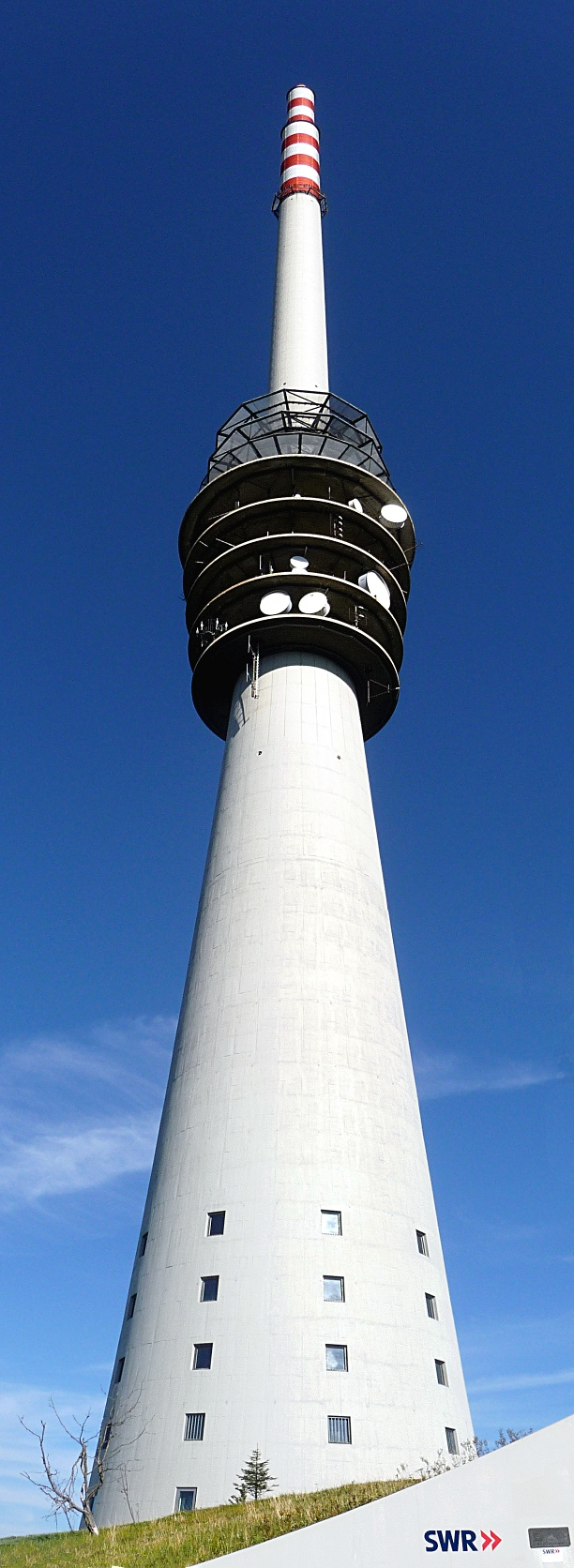 Senderturm Hornisgrinde